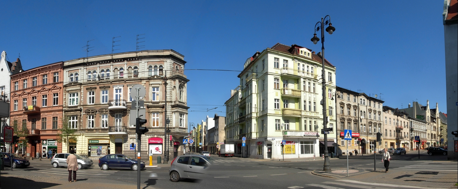 Ulica Gdańska w Bydgoszczy